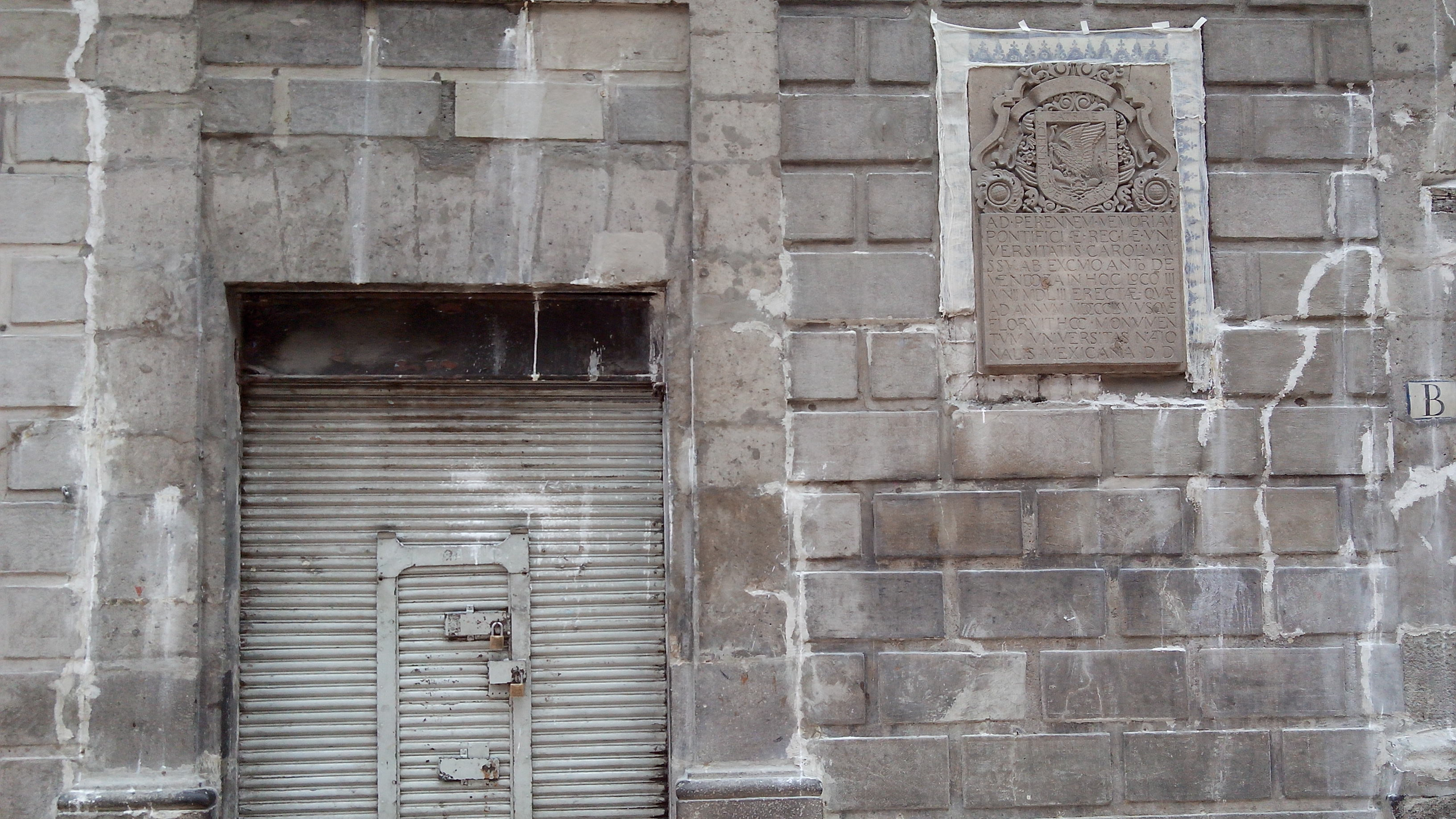 hoy sede de la UNAM.